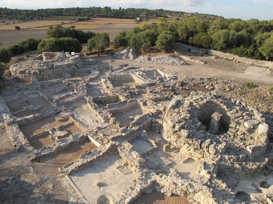 Zona central excavada fins l'any 2011.